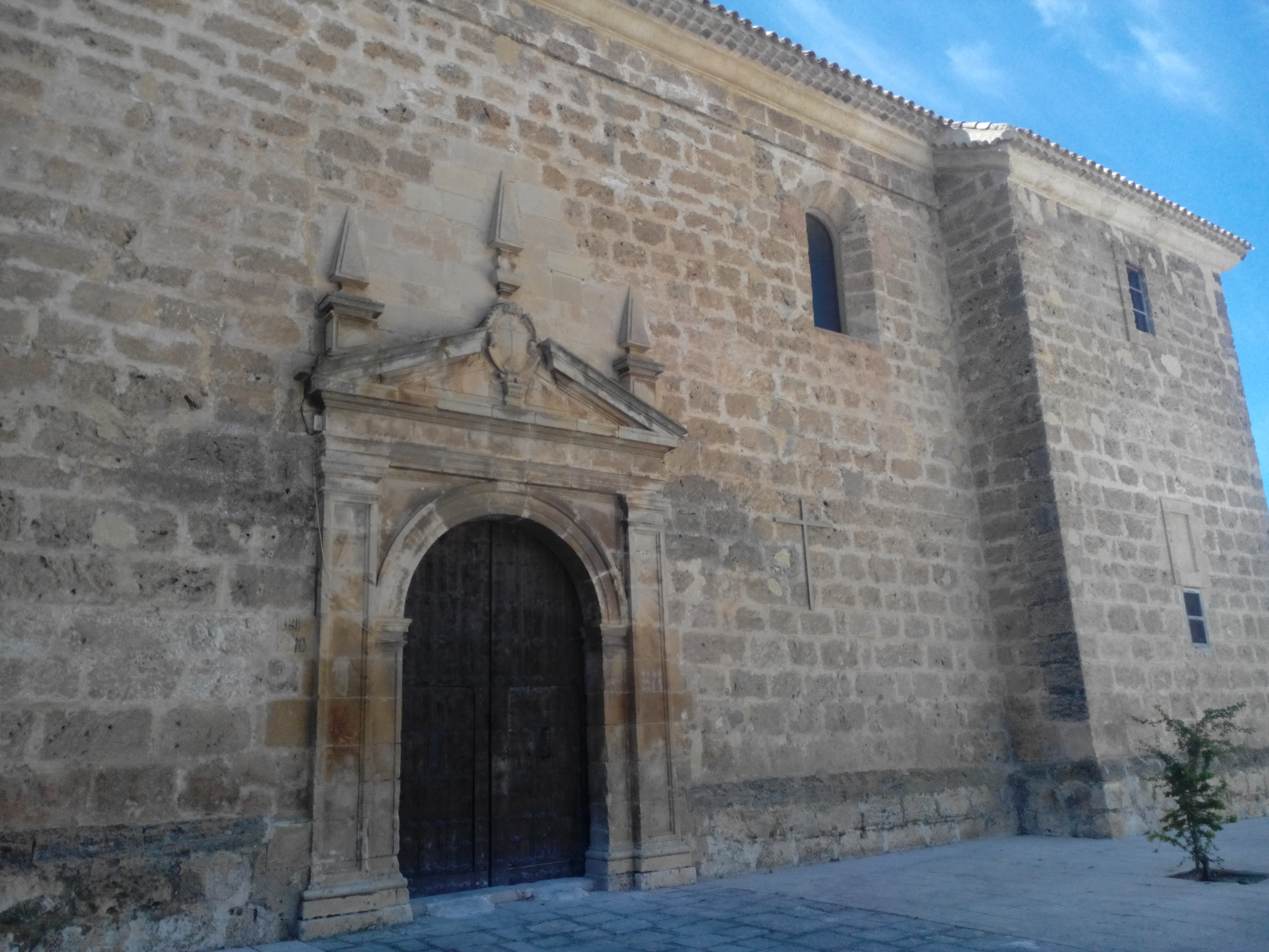 Iglesia de la Santa Cruz de Pegalajar (Jaén - España).